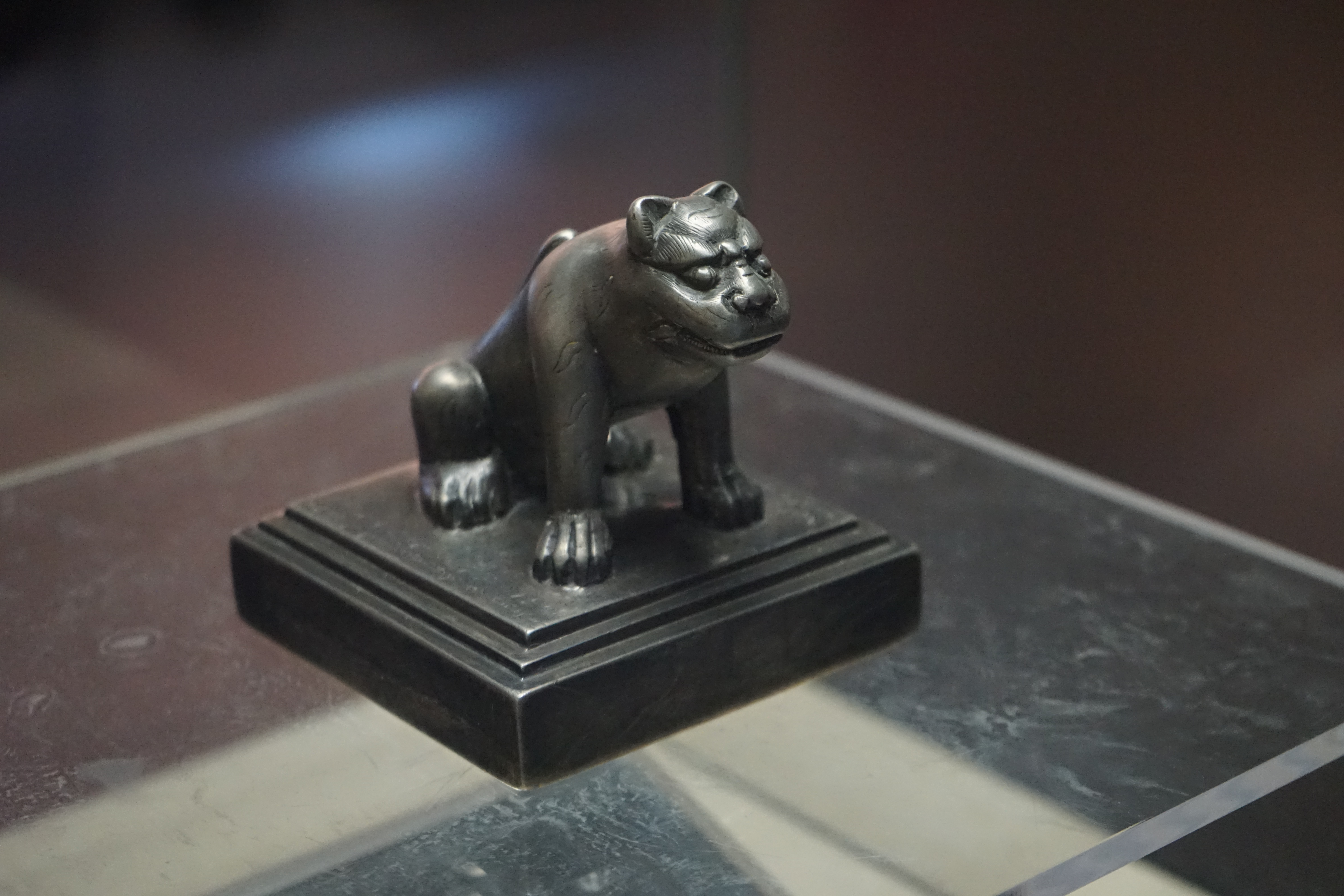 科尔沁为部落旧名，位于今吉林省西部哲里木盟郭尔罗斯前旗、黑龙江省西南部的杜尔伯特、肇源县，内蒙古的扎赉特旗。这是清政府颁发给科尔沁左翼郭尔罗斯后旗扎萨克的官印